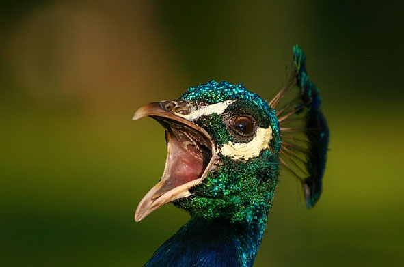 schreeuwende pauw